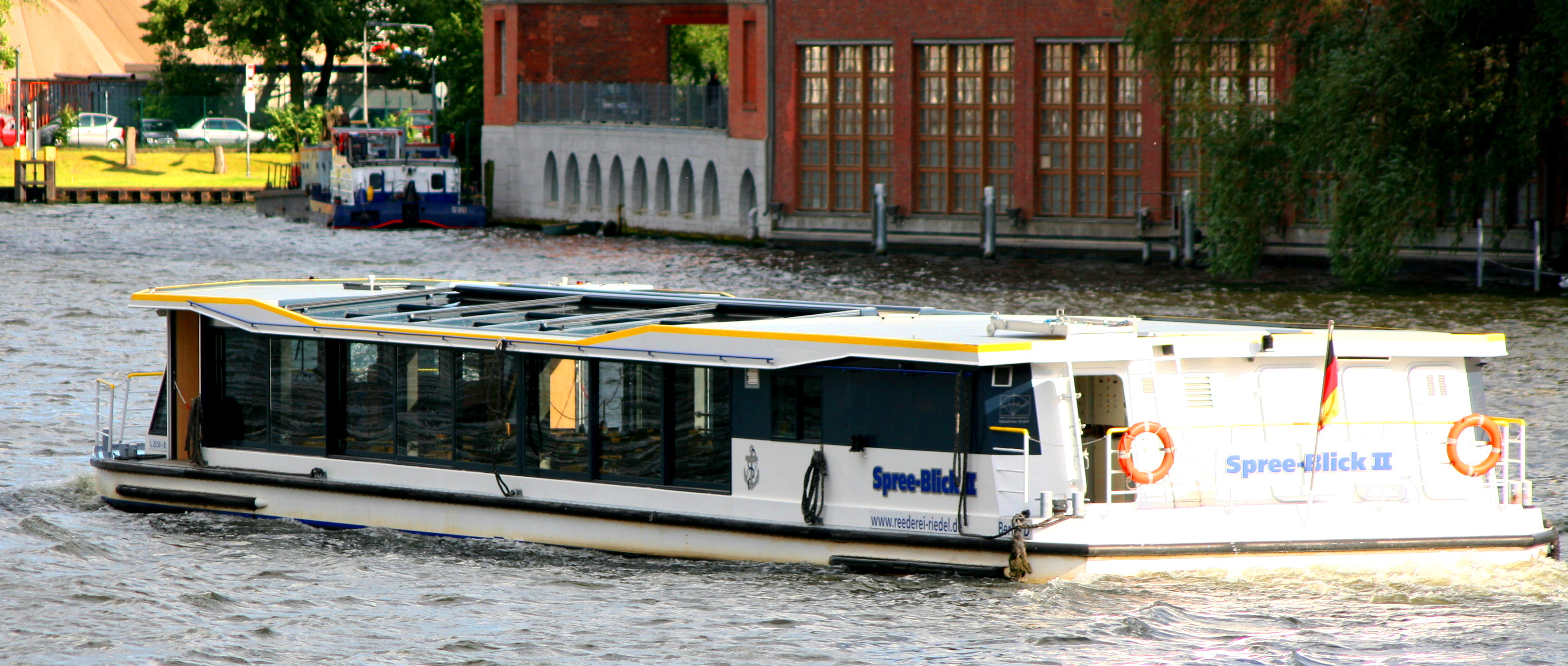 Die MS Spree-Blick II der Reederei Riedel auf der Spree (etwa in Höhe der Oberbaumbrücke)